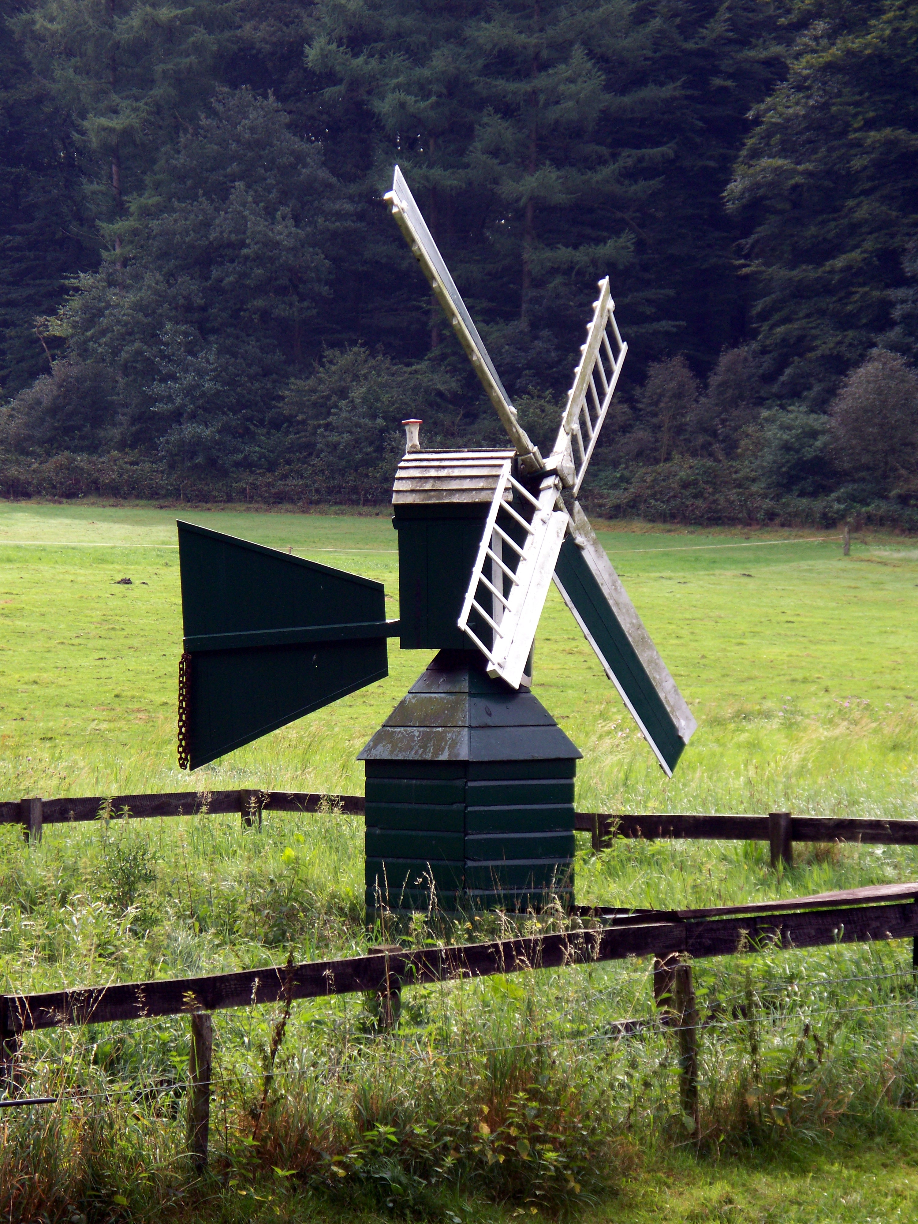 Weidemolen in Openluchtmuseum Arnhem